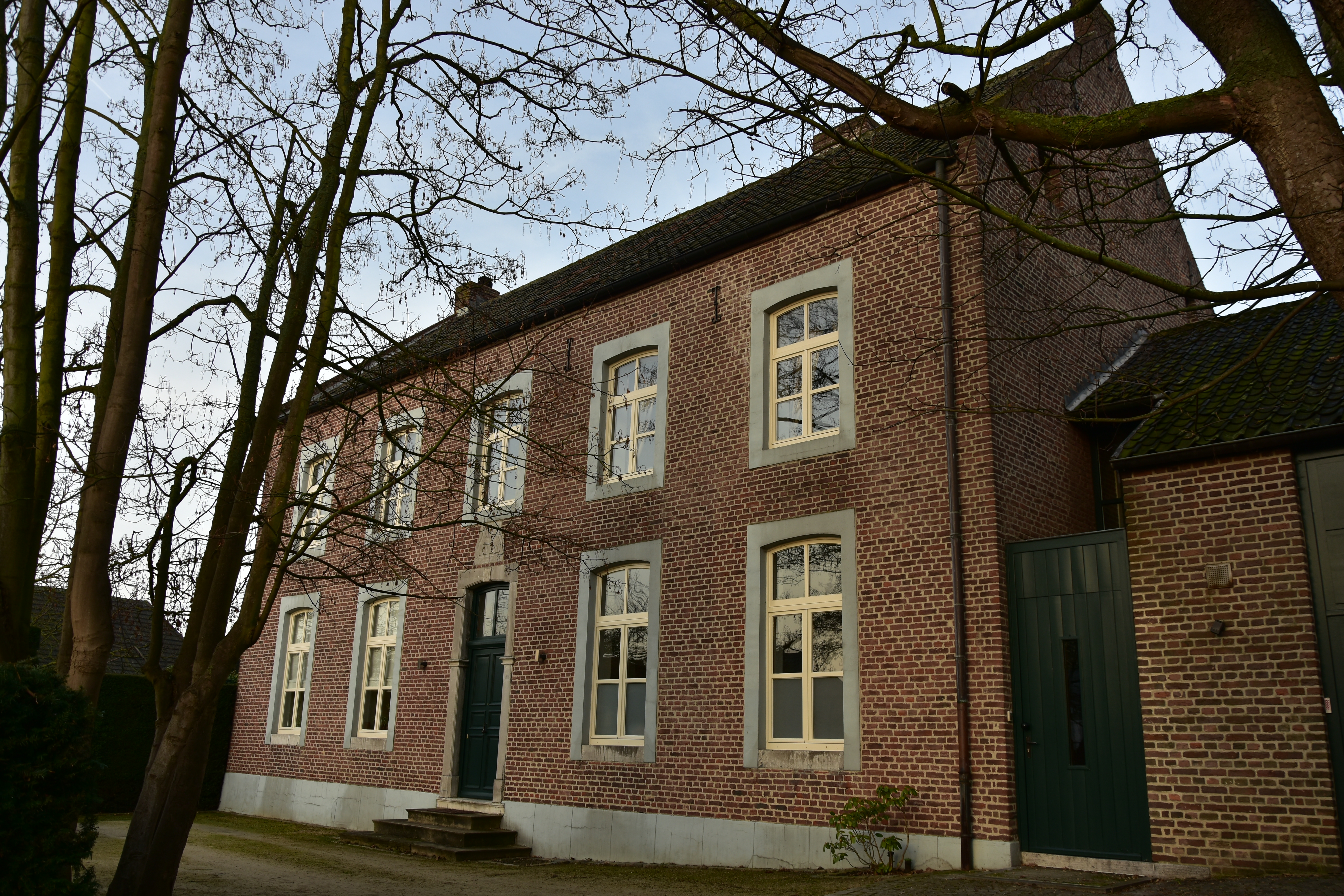 Voormalige pastorie (1138) Boorsem 28-12-2019